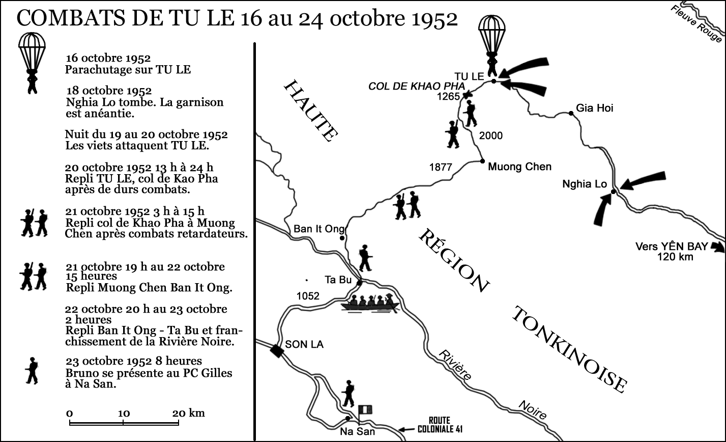 Carte et chronologie de la retraite de Tu Lê (16 au 23 octobre 1952).